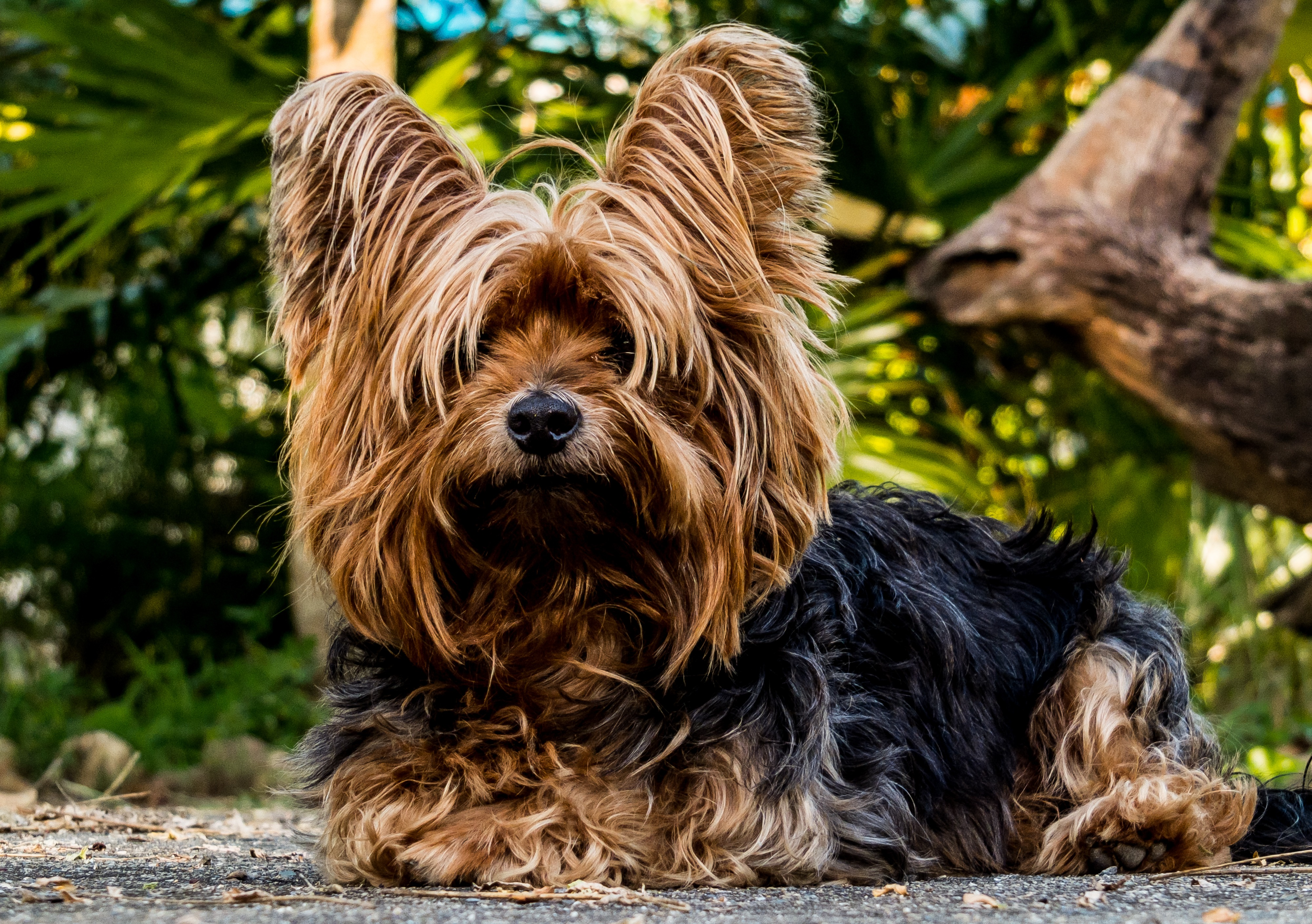 Perro yorkshire terrier perro pequeño